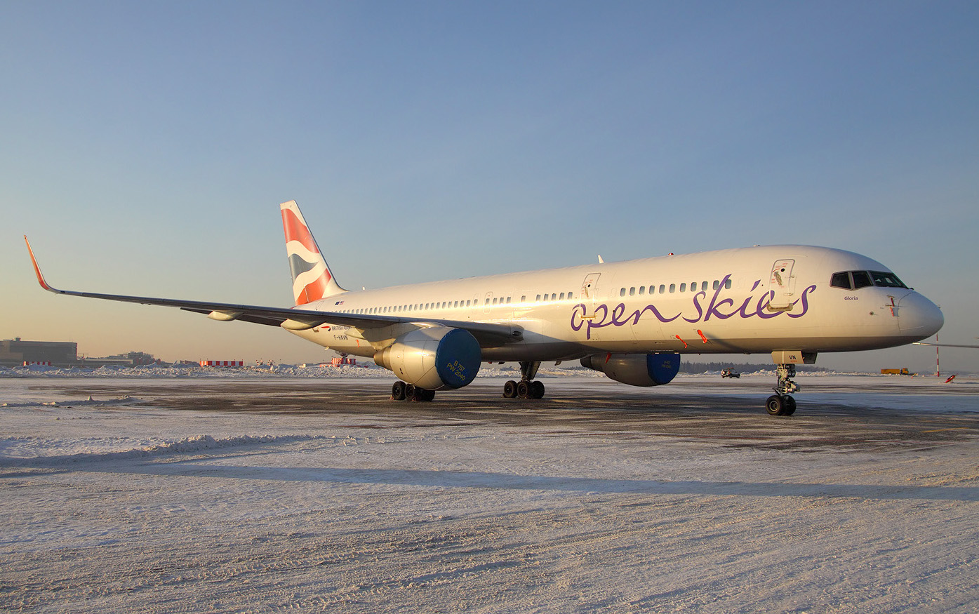 F-HAVN (cn 25140/382)